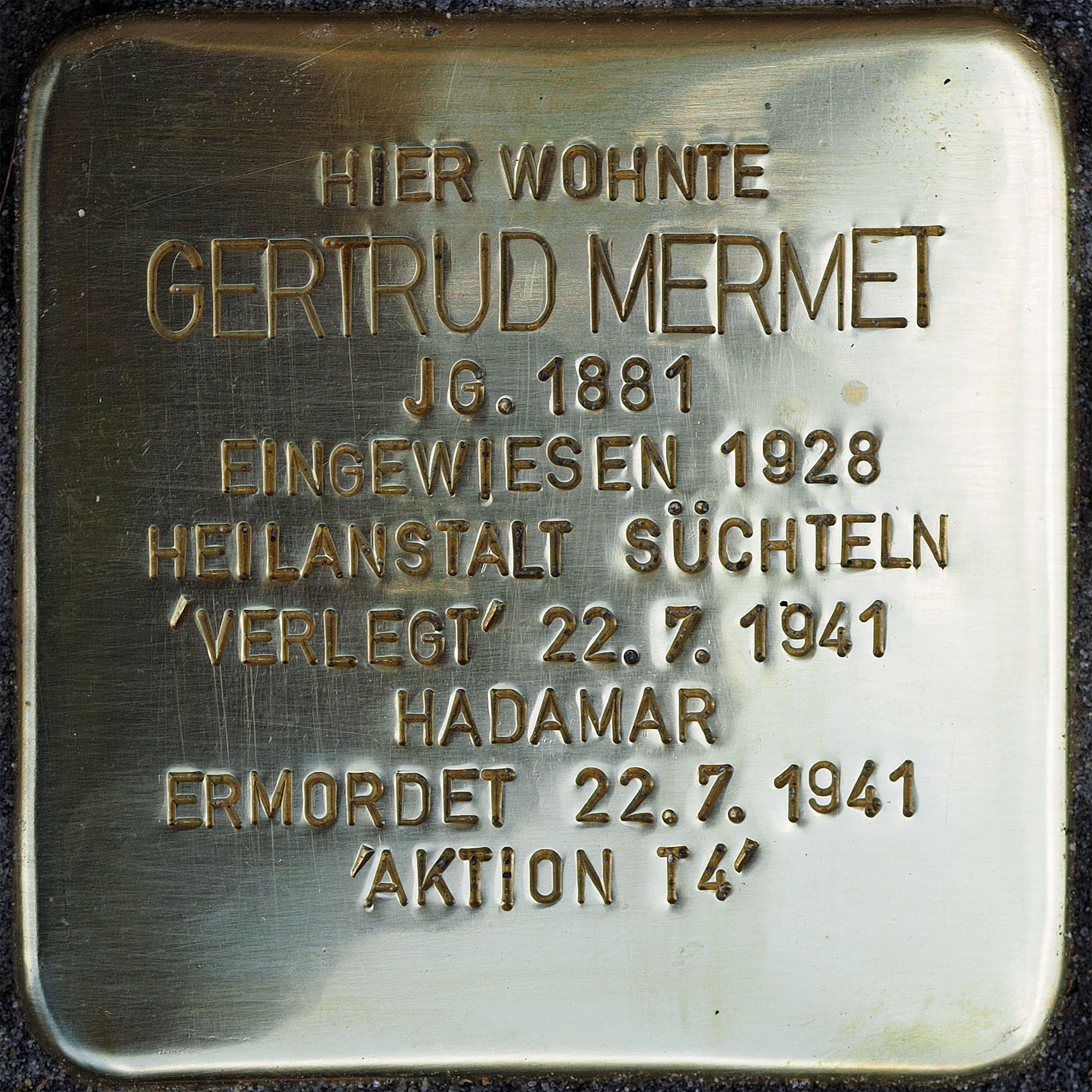 Stolpersteine Kempen: Mermet, Gertrud